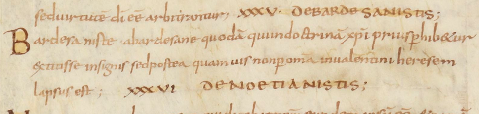 Августин в книге «De Haeresibus ad Quodvultdeum Liber Unus» («Ереси, попущением Бога, в одной книге») о вардисианистах. «Smaragdus». рукопись IX века.